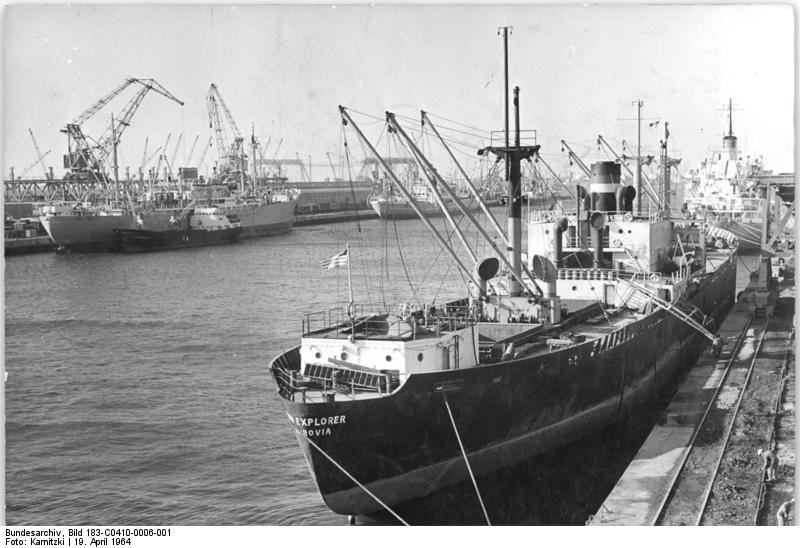 Rostock, Überseehafen, Frachtschiffe Zentralbild Karnitzki 10.4.1964 Über 131 DM Devisen haben die Umschlagarbeiter im Rostocker Überseehafen bisher in diesem Jahr zusätzlich erwirtschaftet. Diese Summe resultiert daraus, daß von 139 Schiffen aus 30 Nationen, die seit Jahresbegin im neuen Hafen festmachten, 19 unter der in den Charterverträgen vereinbarten Zeit abgefertigt wurden.